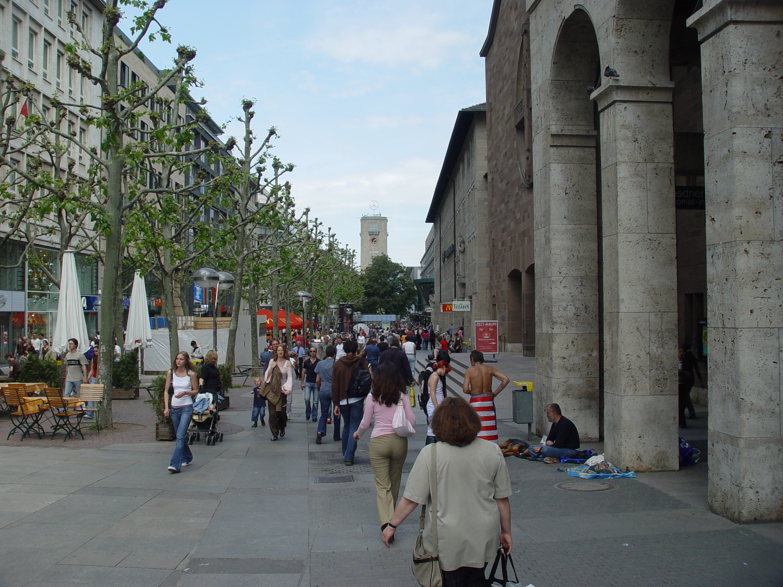 Fußgängerzone in Stuttgart, im Hintergrund der Bahnhofsturm by: Martin Dürrschnabel